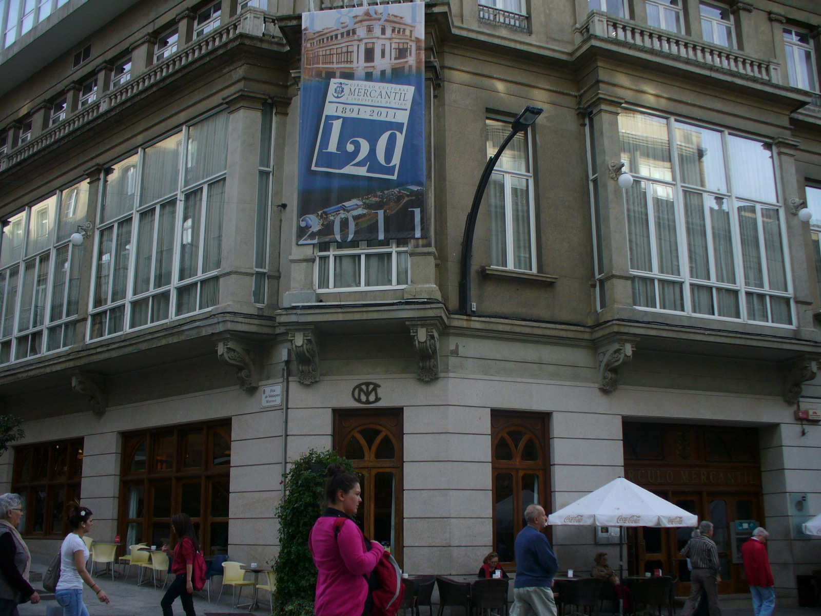 Komerca Rondo, Vigo